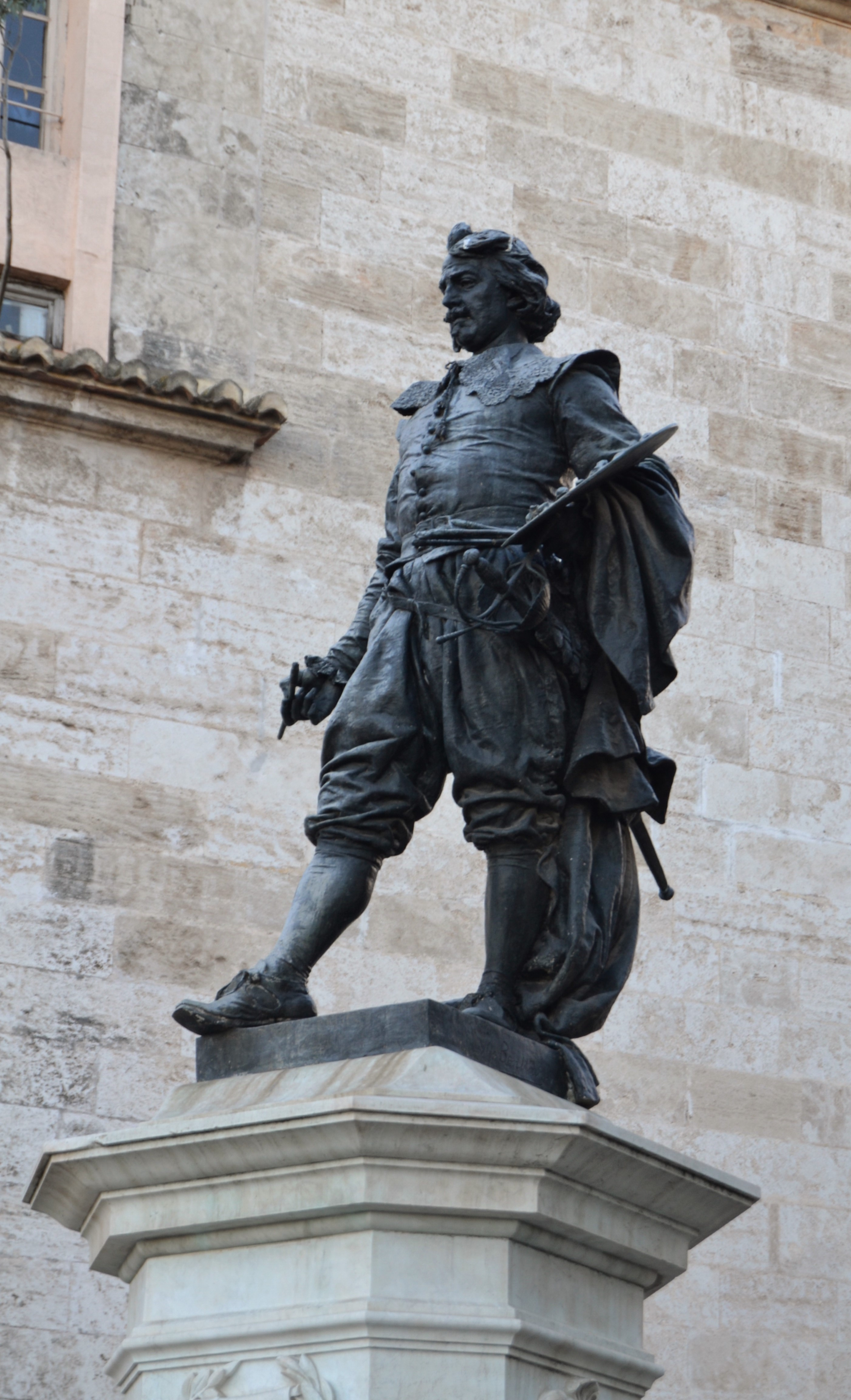 Monument a Josep de Ribera, València.